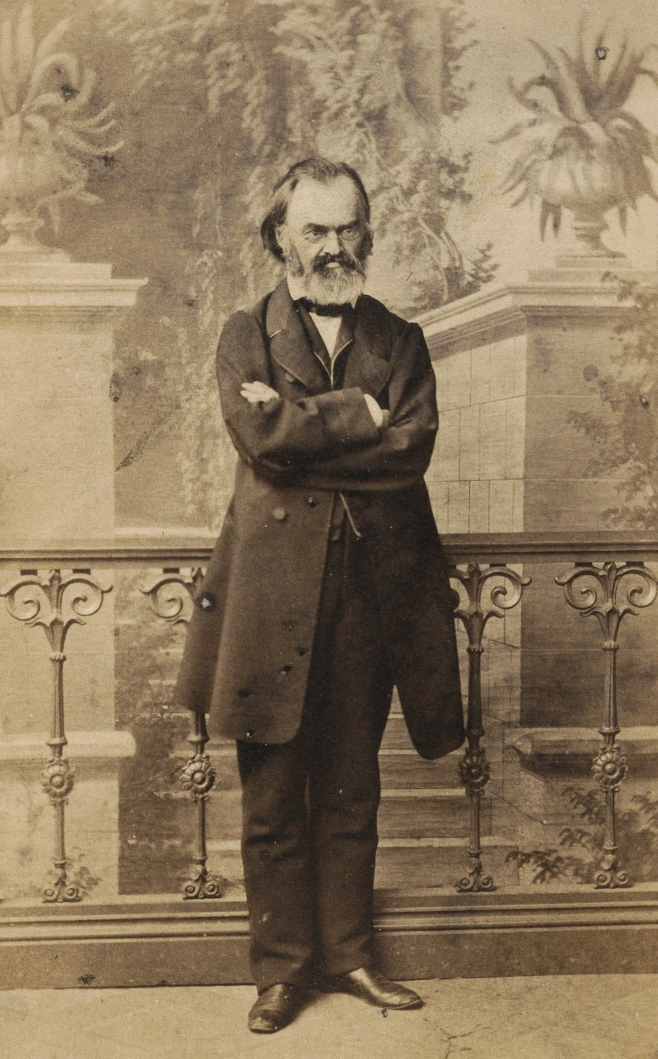 August Cieszkowski, ok. 1865 r.